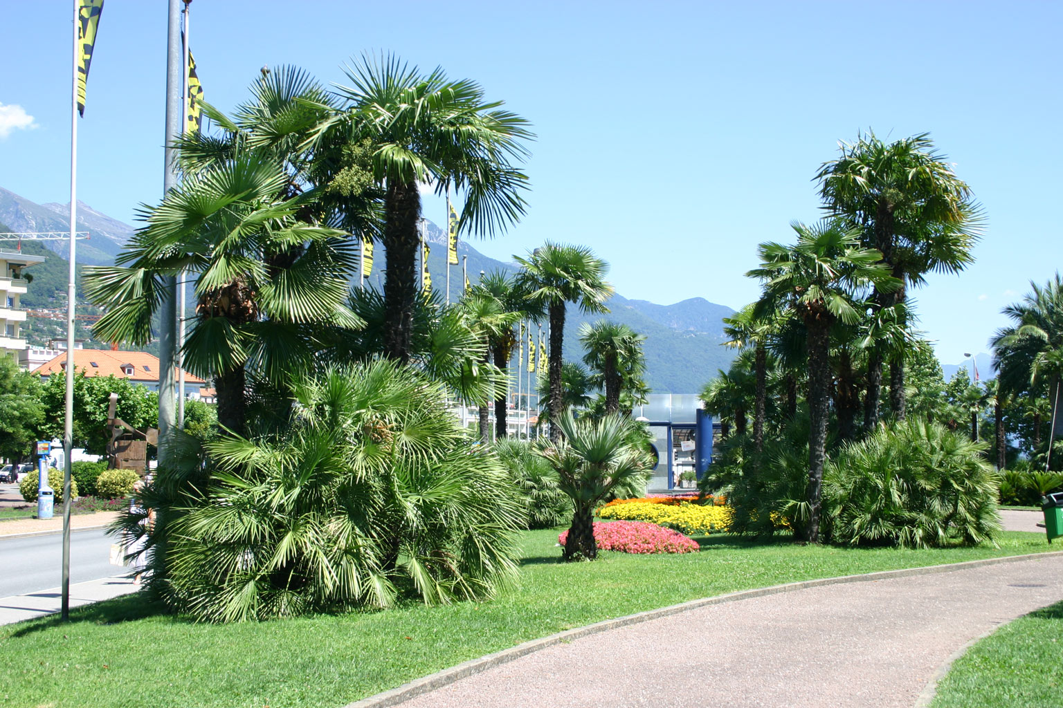 Park im Zentrum von Locarno Bild von Steven Utiger, Juli 2005 OTRS 20:34, 28. Jul 2006 Ticket#: 2006072810016318